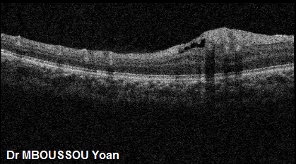 présence d'un tissu fibreux moyennement réflectif en peripaillaire